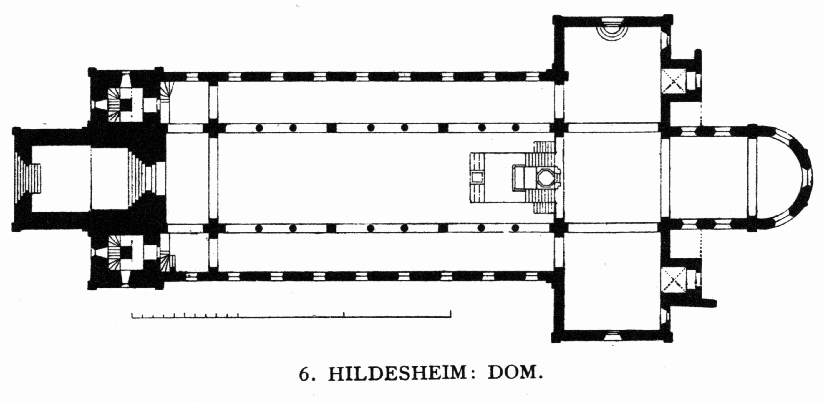 Hildesheim, Dom. Floor plan.